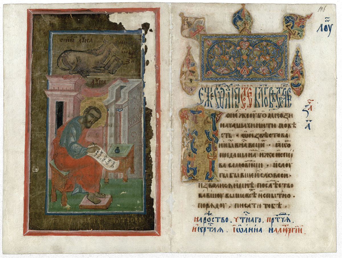 Жыровіцкае Евангелле. Пачатак Евангелля ад ЛукіБеларуская (тарашкевіца): Жыровіцкае Эвангельле (Žyrovickaje Evangielle). Пачатак Эвангельля Сьвятога Лукі